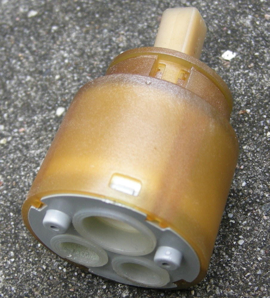 Een cartouche voor een badmengkraan